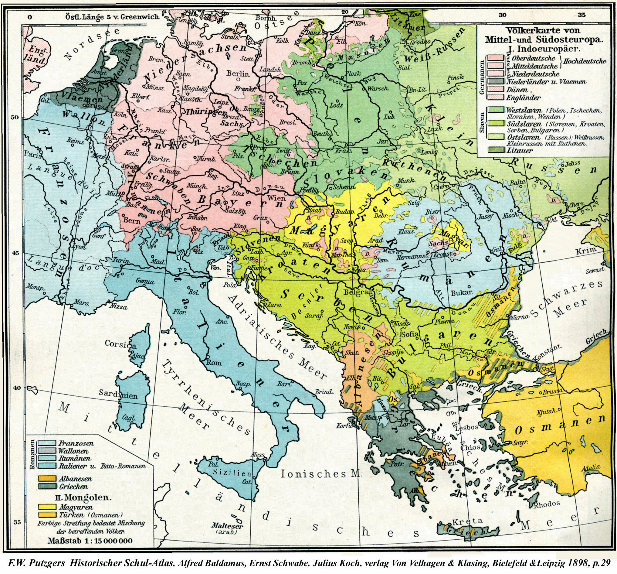 Carte linguistique de l'Europe centrale en 1898 (en allemand) Ethnic map of Central Europe, 1898 (german)